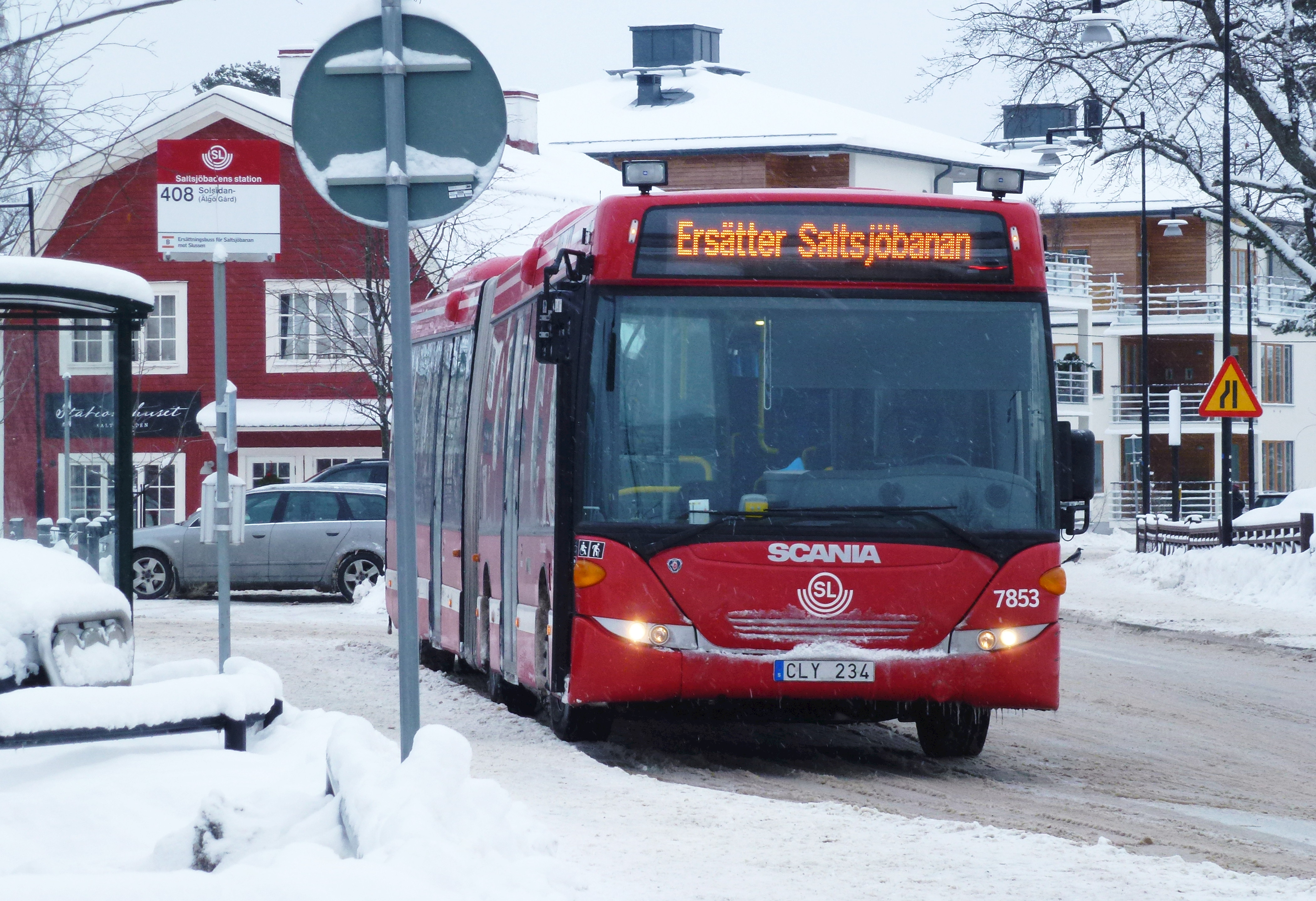 Saltsjöbadsolyckan ersättningsbuss